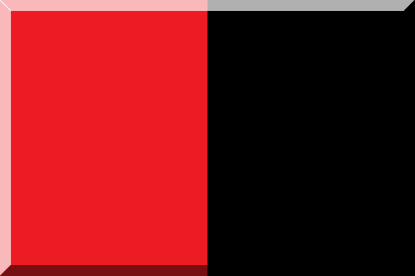 Rosso e Nero